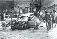 strage di Pizzolungo